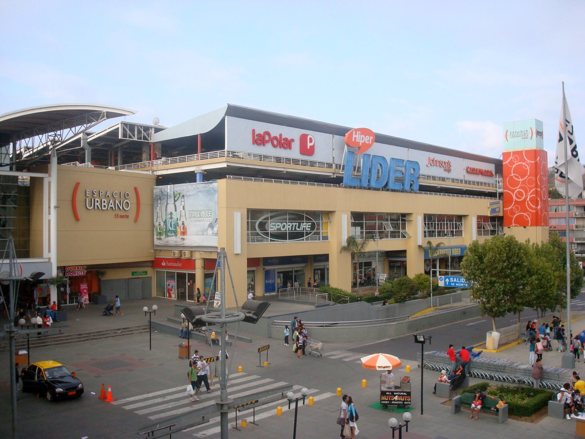 Espacio Urbano 15 norte, Viña del Mar, Chile